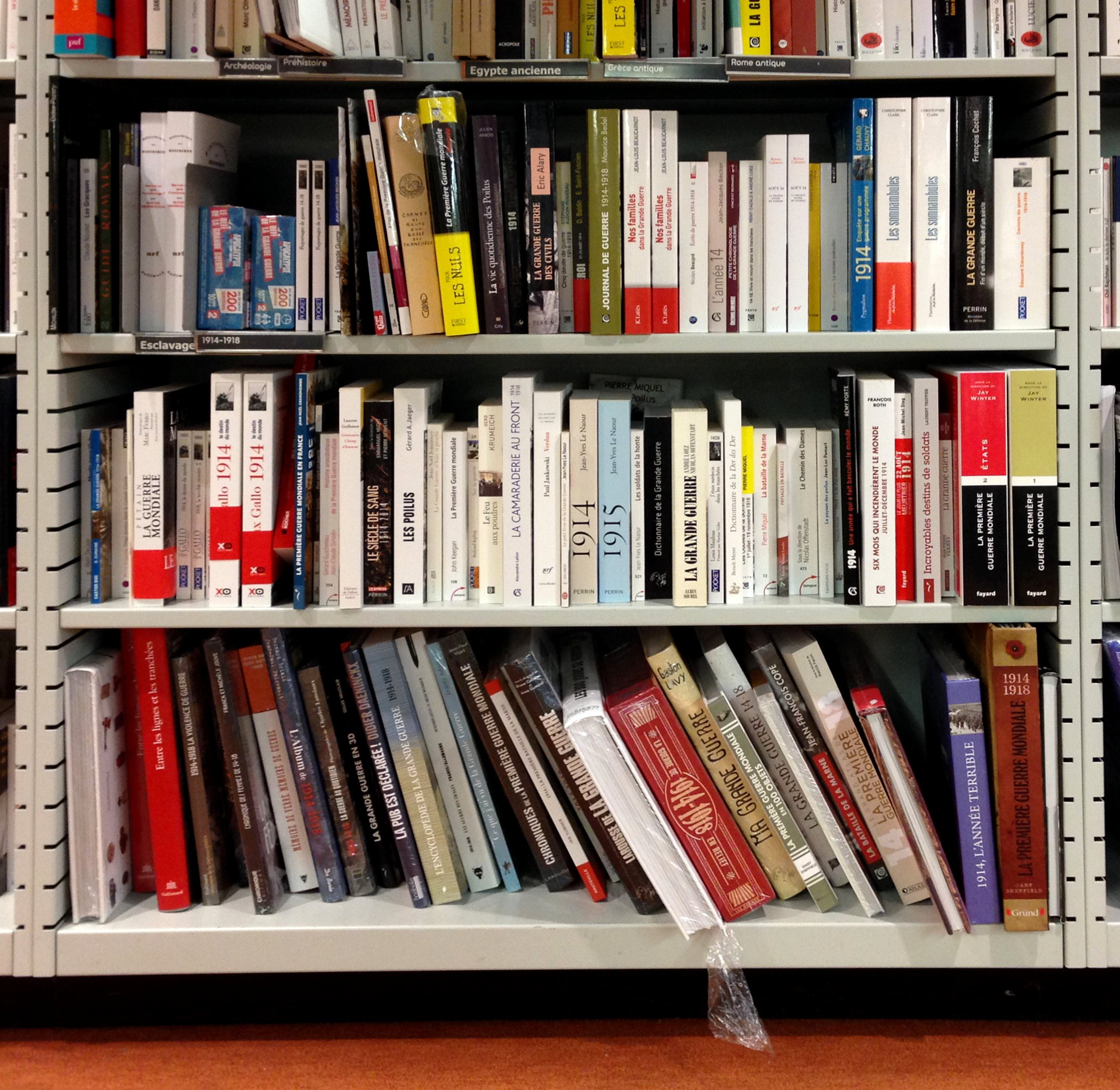 Étagères avec des livres consacrés à la Première Guerre mondiale dans une librairie.